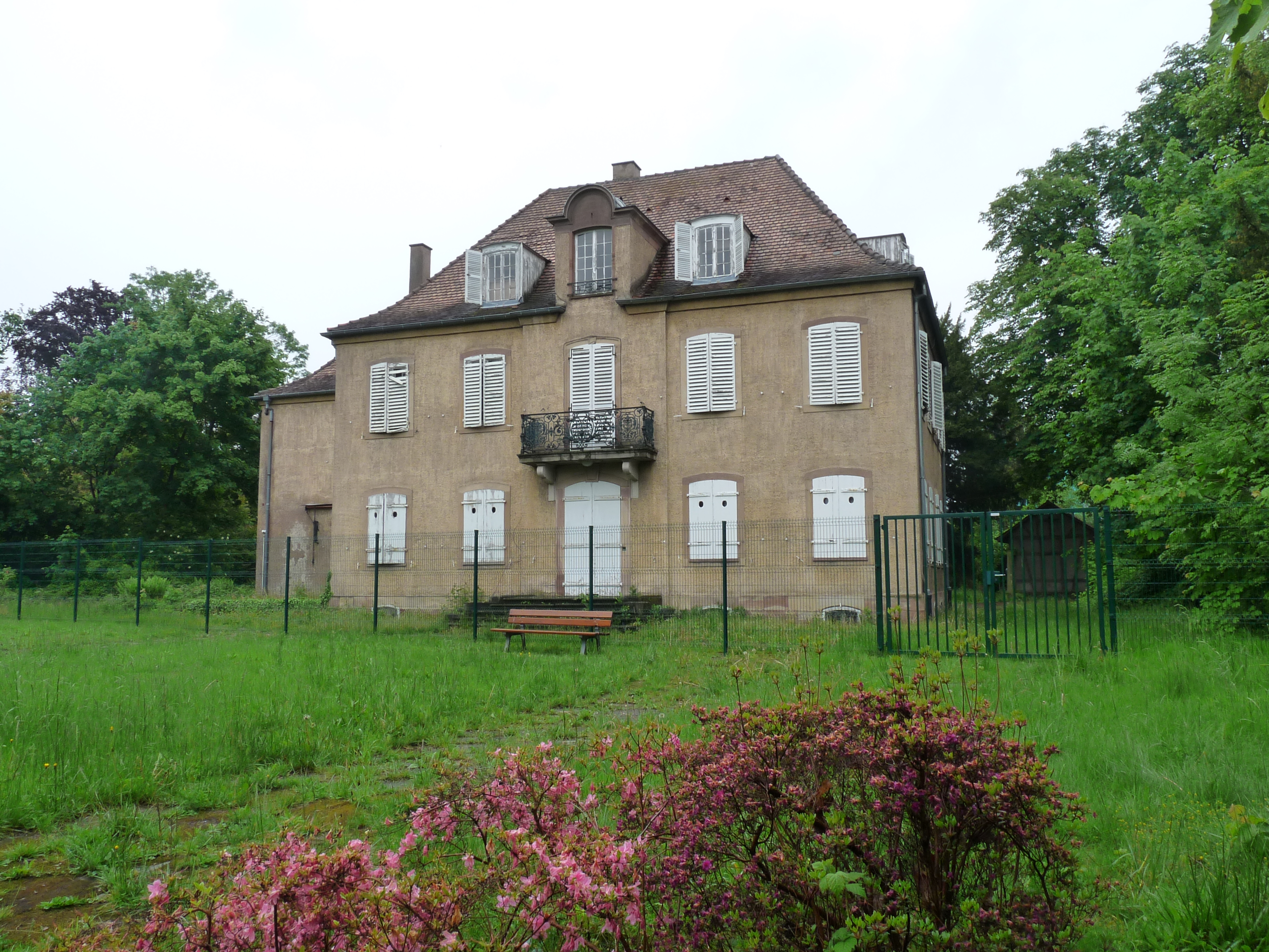 Domaine du Kaysersguet (parc Henri-Louis Kayser + ancienne villa de Heinrich Ludwig Kayser), quartier de la Robertsau, Strasbourg